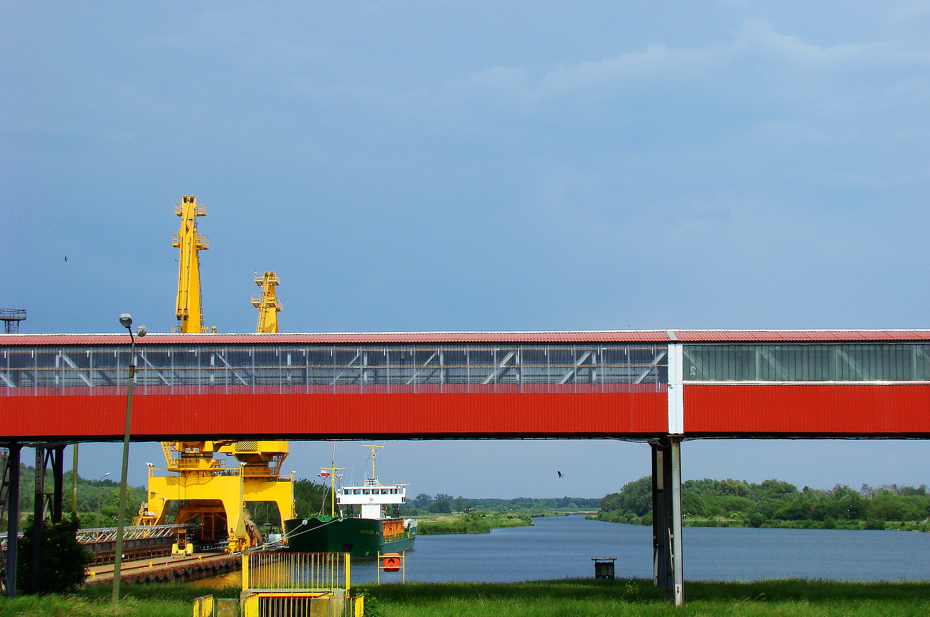 Port morski Police – Terminal Barkowy – w tle kanał portowy. Województwo zachodniopomorskie, Polska